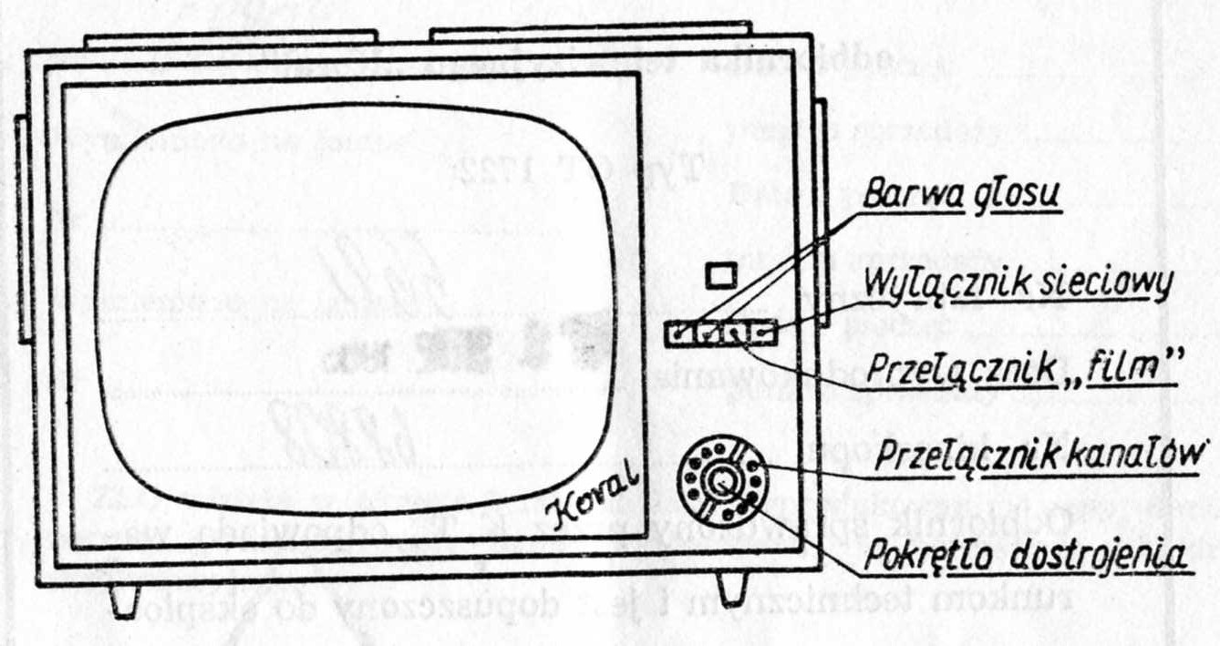 Opis przedniego panelu telewizora Koral.